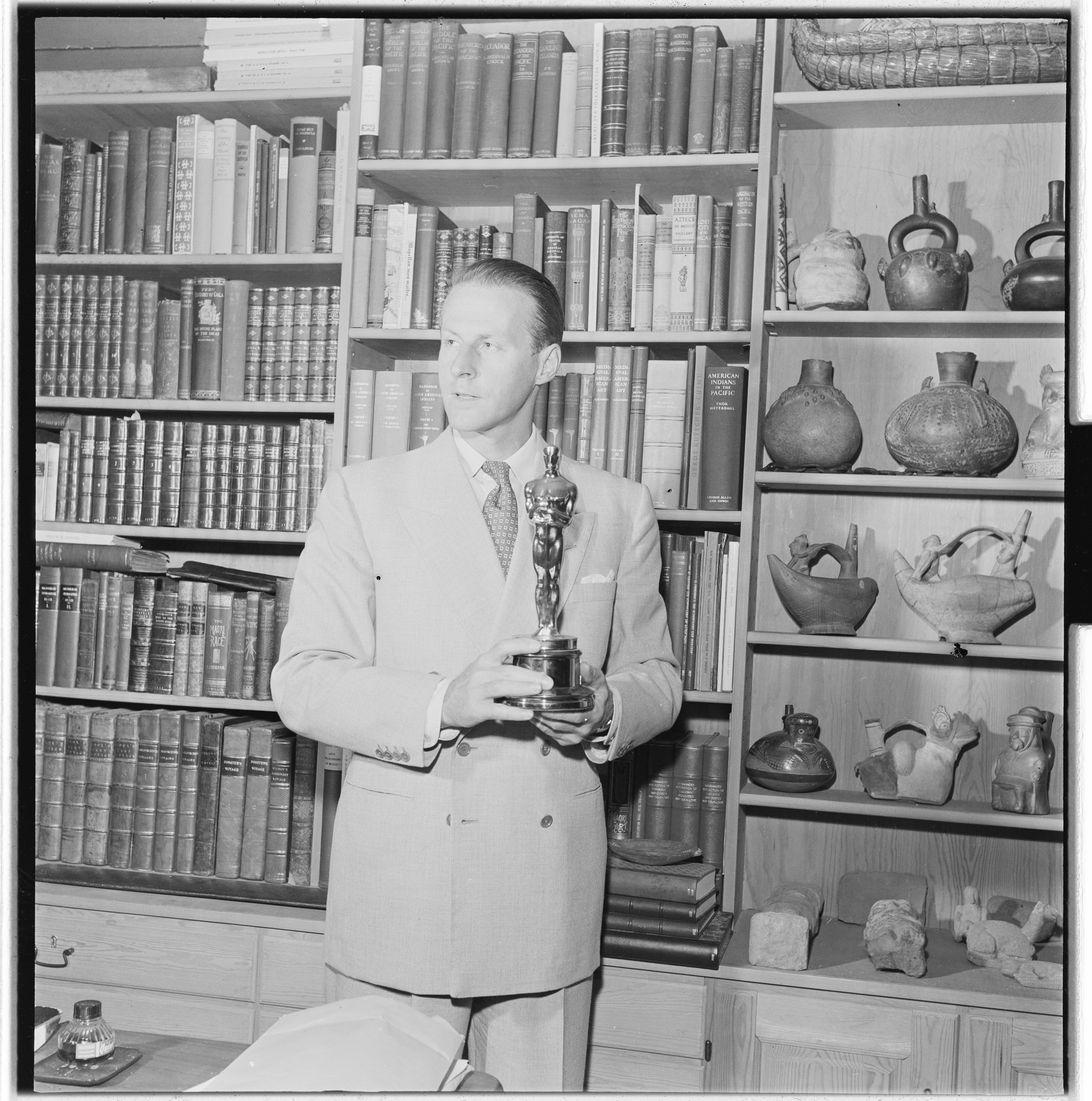 Bildet er hentet fra Arkivverket. Thor Heyerdahl Arkivinstitusjon : Riksarkivet Arkivnavn : Billedbladet NÅ Sted : Norge, Ukjent, Ukjent, Ukjent Emneord: Oppdagere, Kon-Tiki, Menn Avbildet: Heyerdahl, Thor